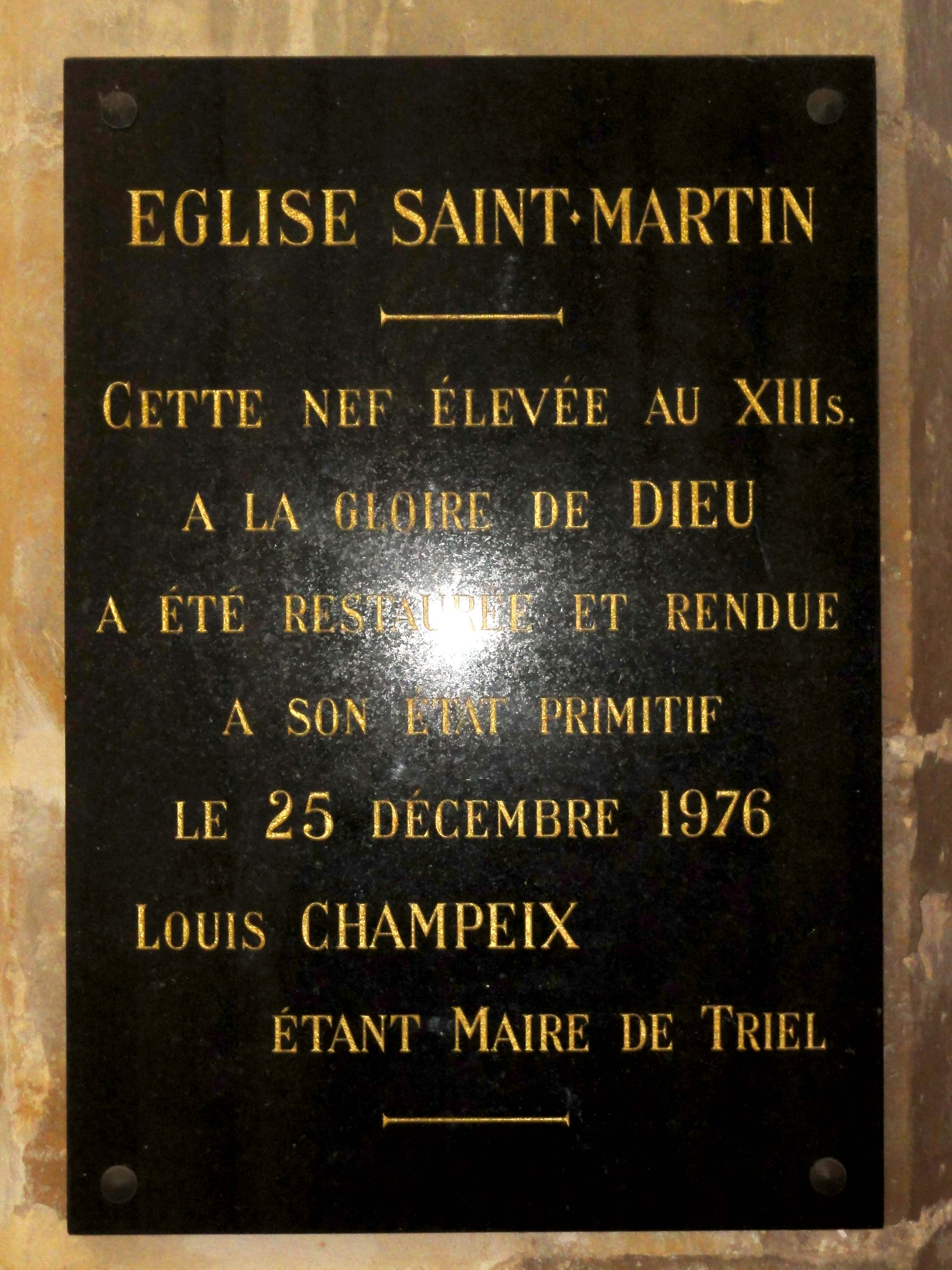 Mobilier de l'église - voir titre.